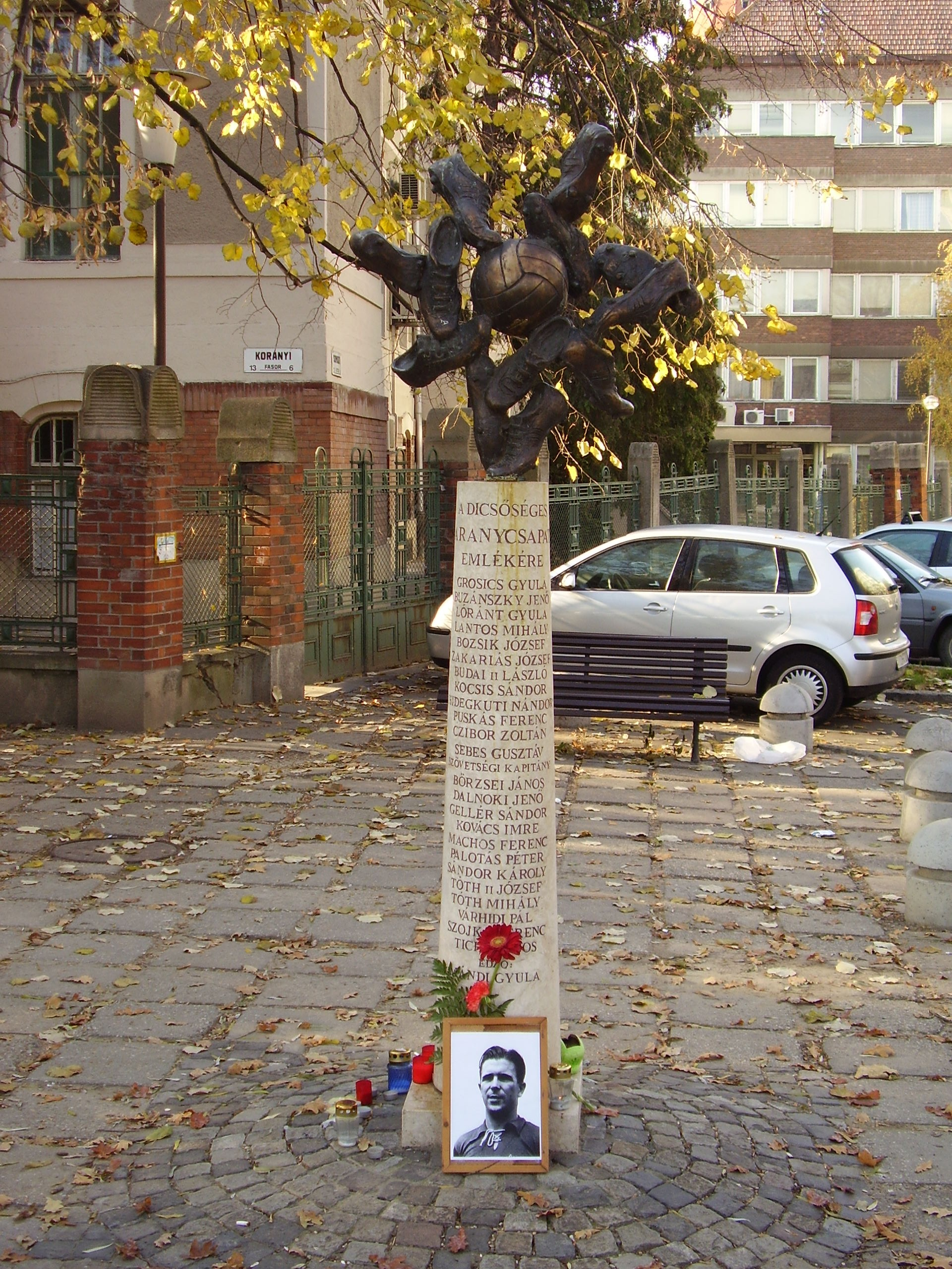 Die Skulptur „Goldene Elf“ von Márton Kalmár in Szeged am 18. November 2006, einen Tag nach Ferenc Puskás' Tod - Fans haben Blumen, Kerzen und ein Gedenkbild niedergelegt. (Foto: Tamás Tóth)